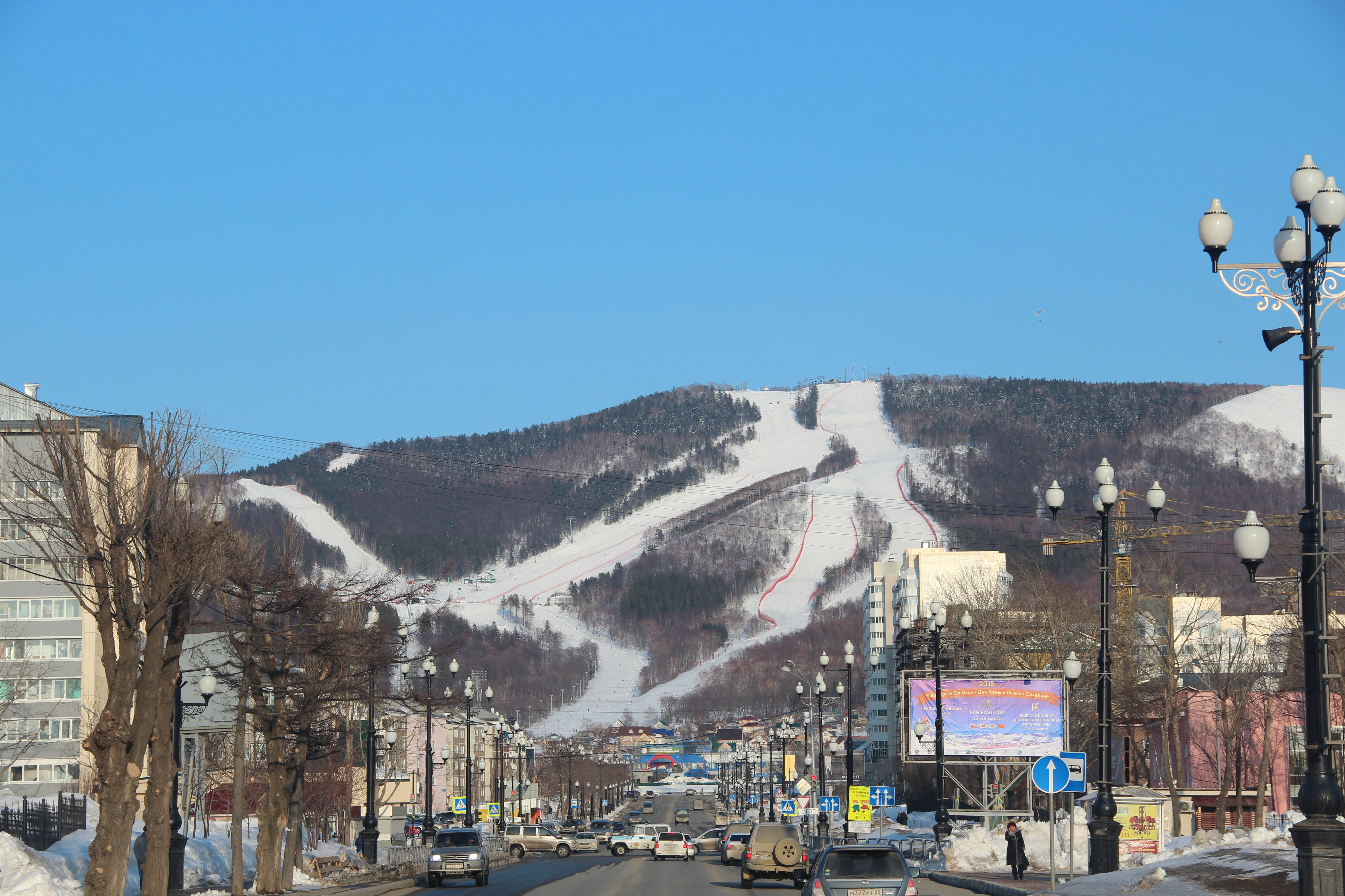 Mountain air ski lodge in Yuzhno Sakhalinsk